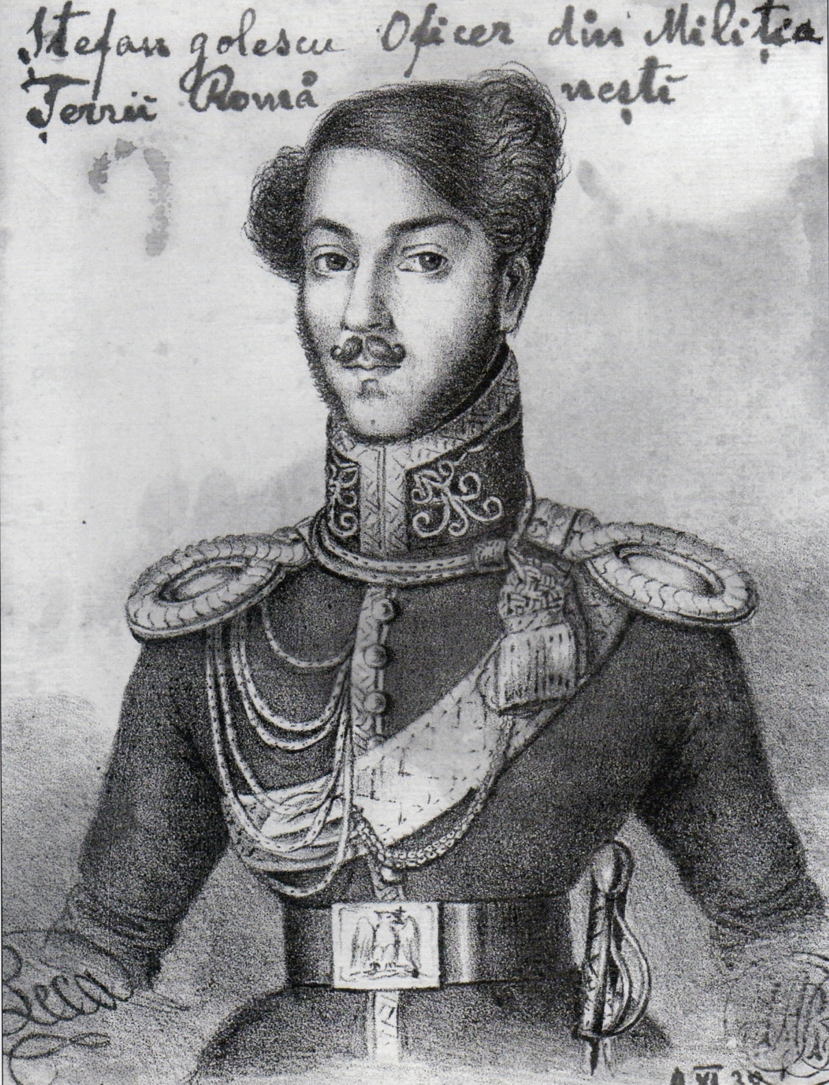 Ștefan Golescu, litografie, Biblioteca Academiei Române